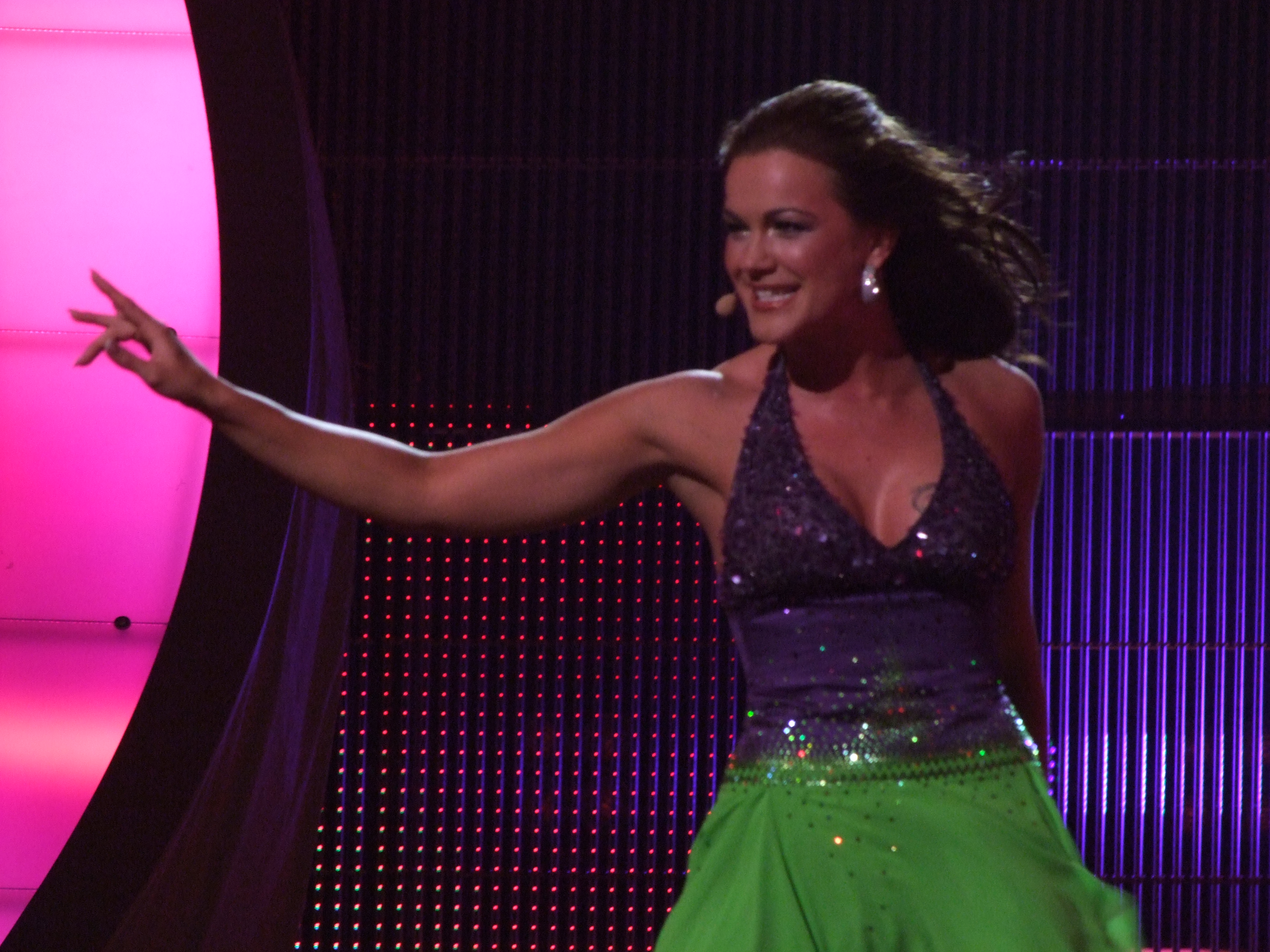 Semifinal 1 EUROVISION 2008